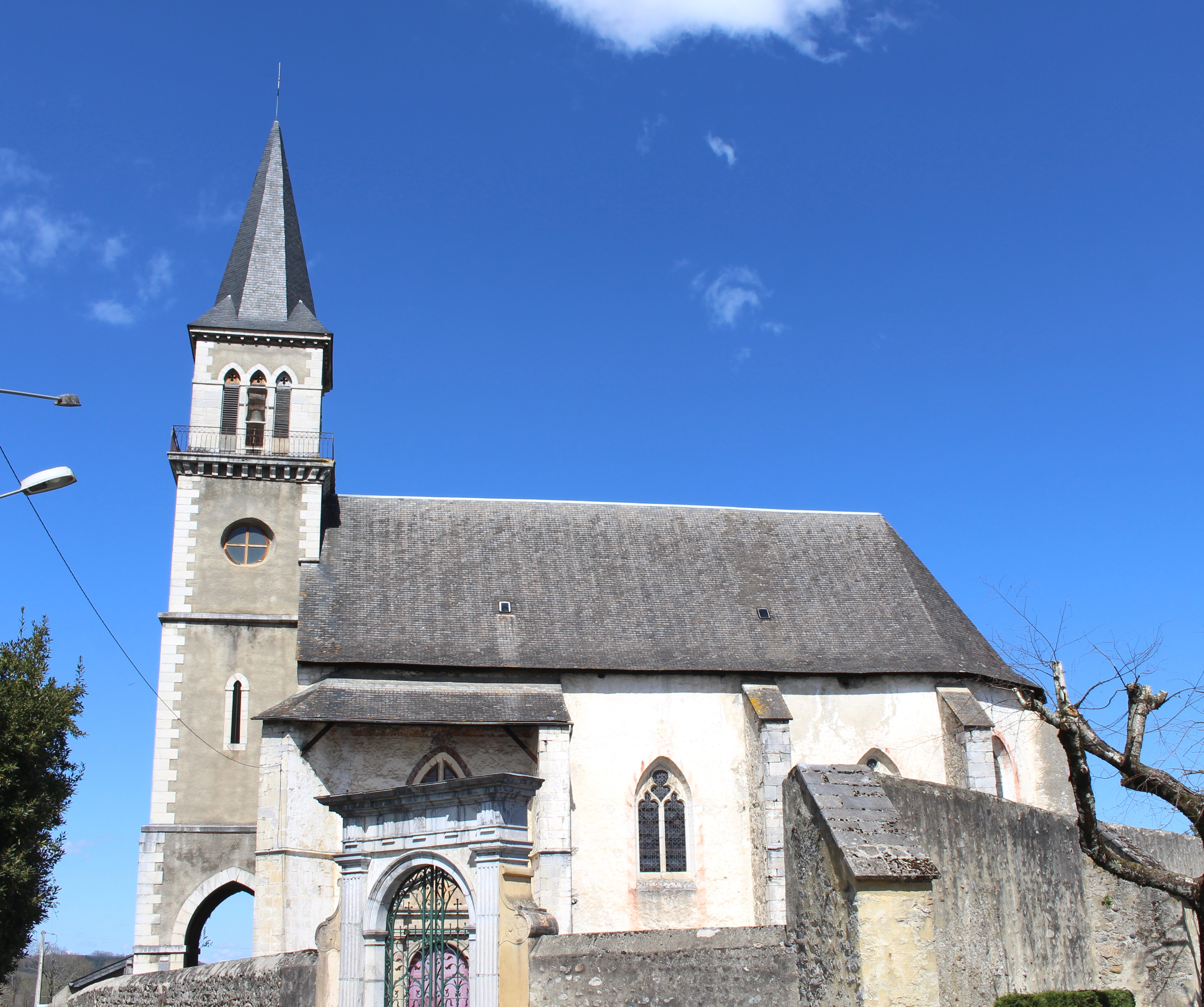 Église Saint-Saturnin de Pouzac (Hautes-Pyrénées)